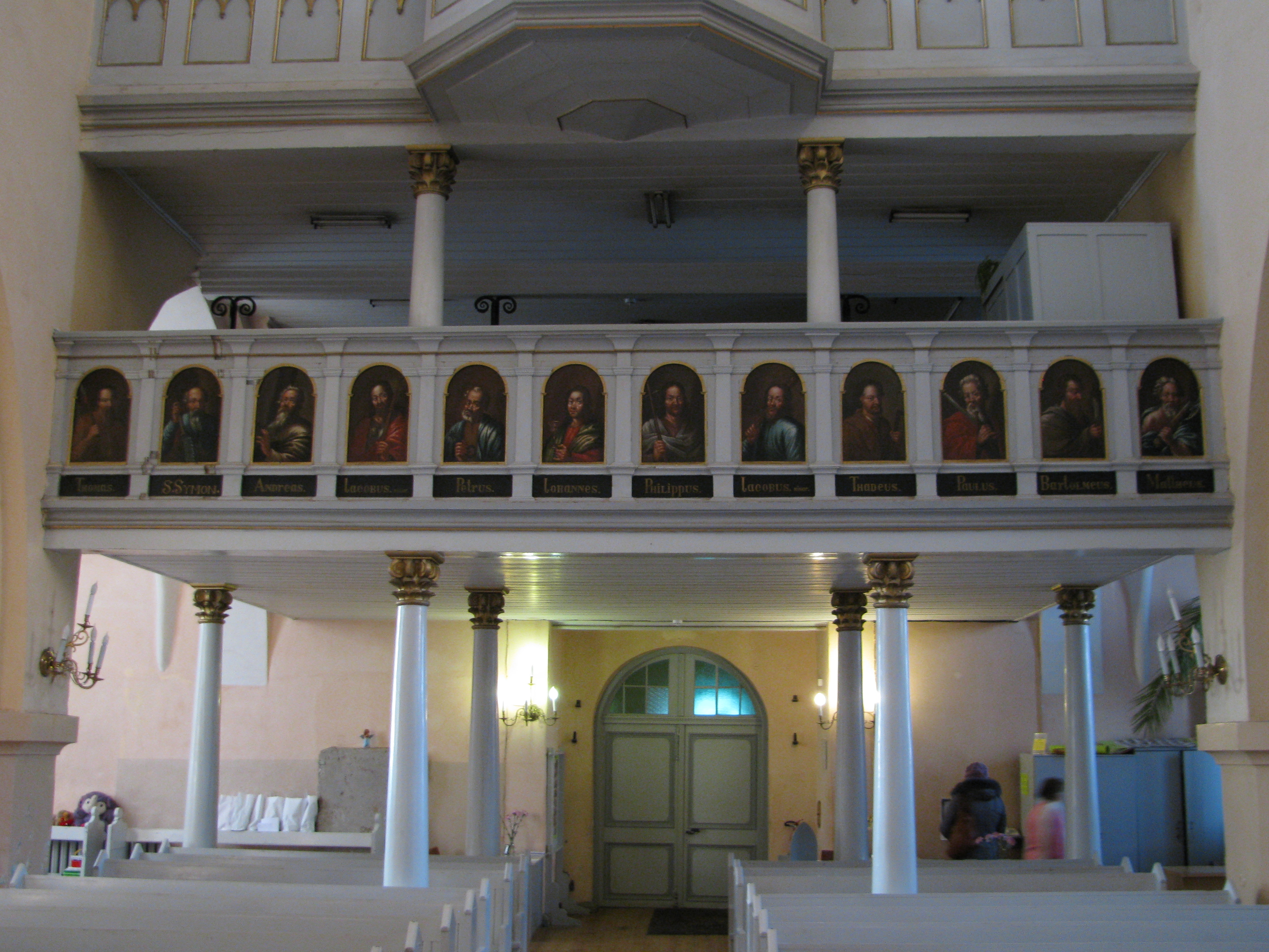 Ērģeļu luktas ar gleznojumiem (12), Valmiera, Bruņinieku iela 2